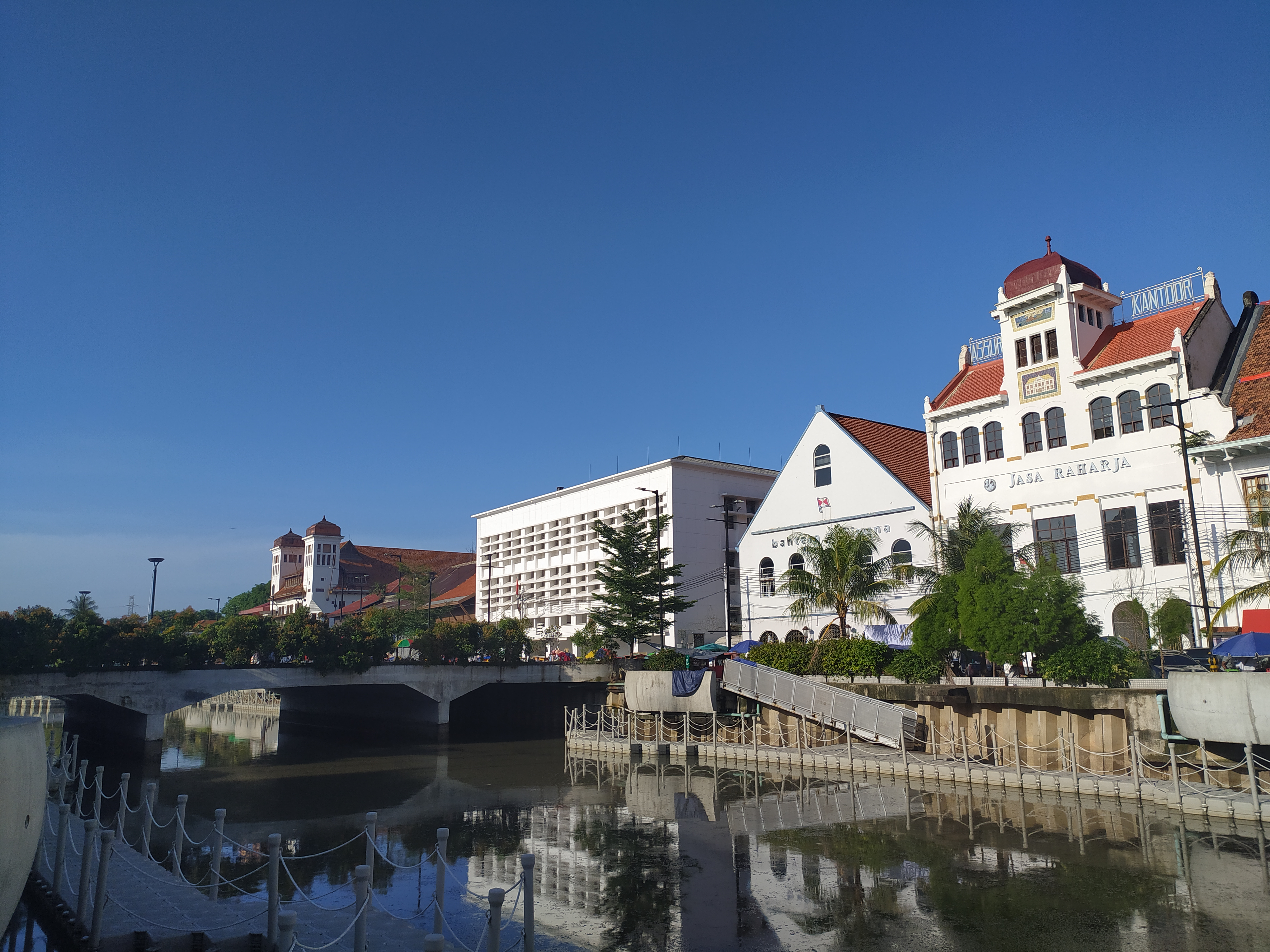 Deretan gedung di Kawasan Kota Tua Jakarta dilihat dari seberang Kali Krukut pada tahun 2020.